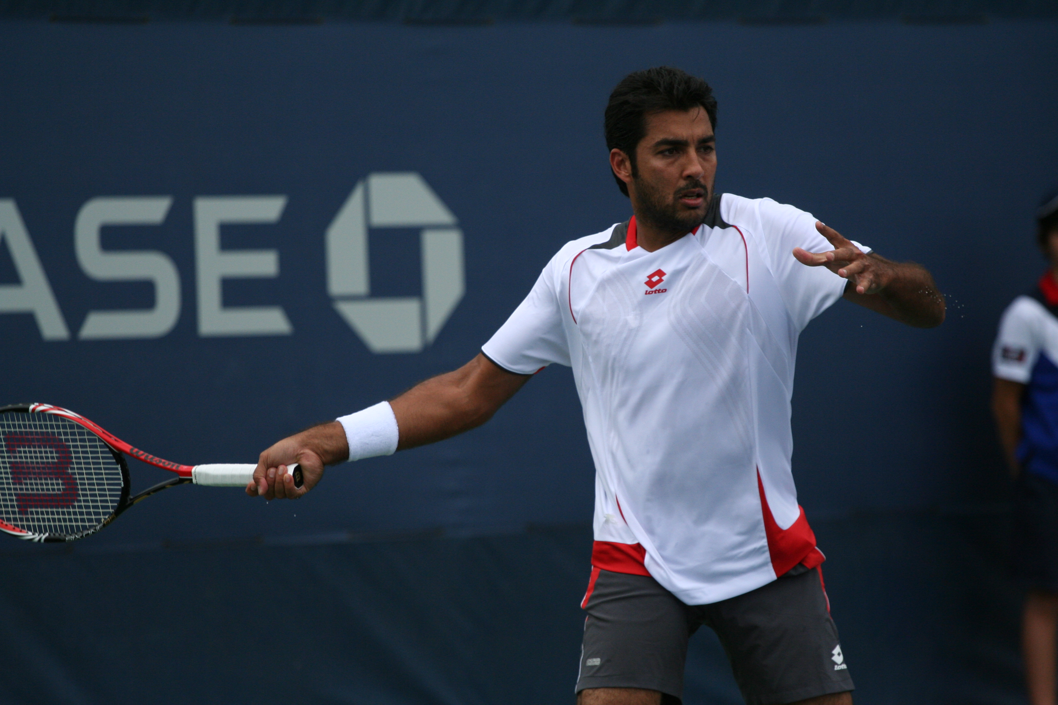 U.S. Open Sept. 3, 2010